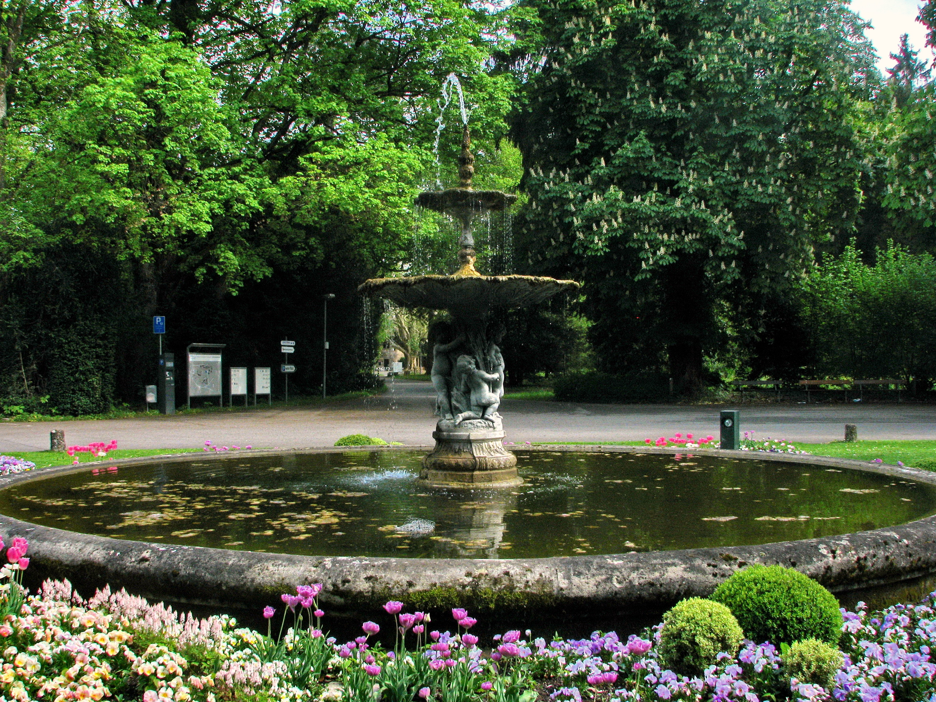 Königsfelden in Windisch (Switzerland)